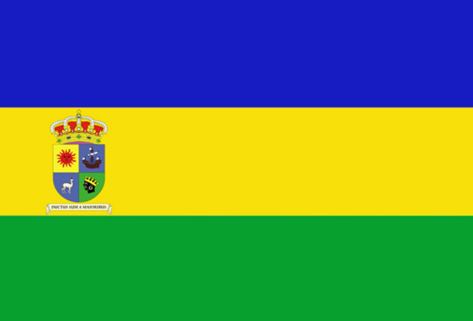 Es la bandera de la región afroboliviana del reino afroboliviano de la República de Bolivia